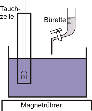 Konduktometrie: schematischer Versuchsaufbau